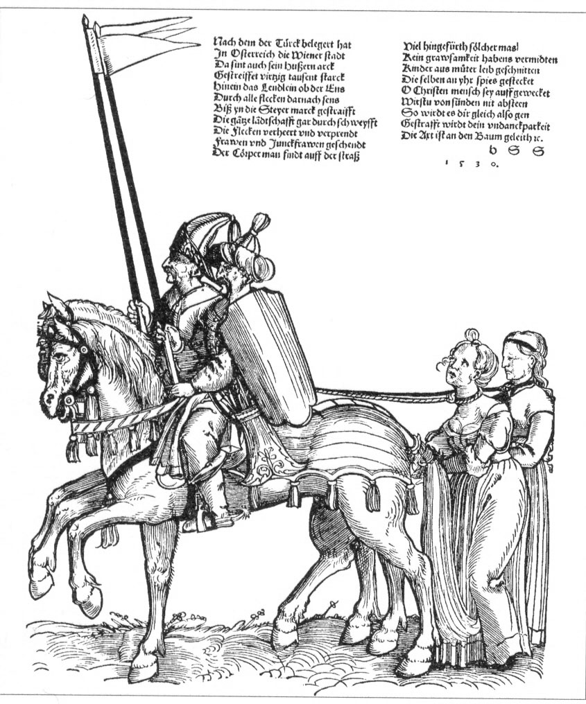 Bewohner Innerösterreichs werden von Osmanen in die Sklaverei entführt — Holzschnitt